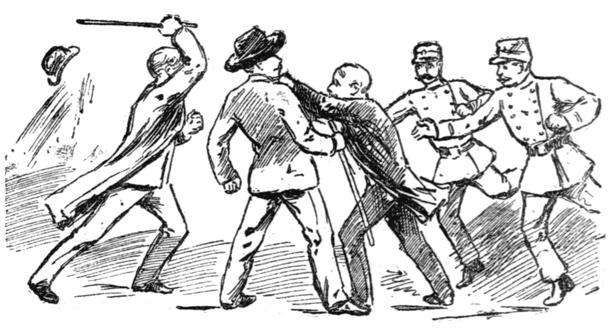 "Arrestation de Guérin par le commissaire Le Proust blessé".